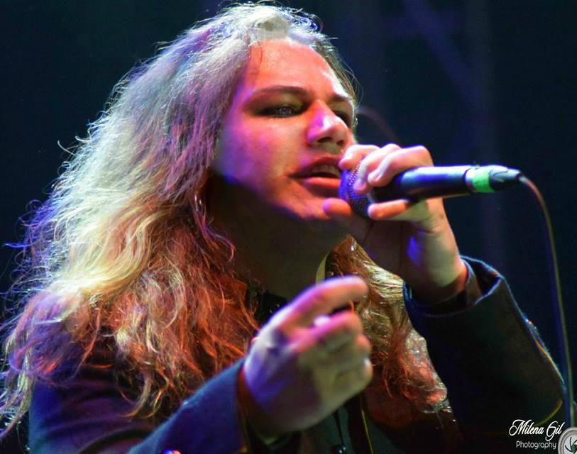 Concierto Supremacy 2012